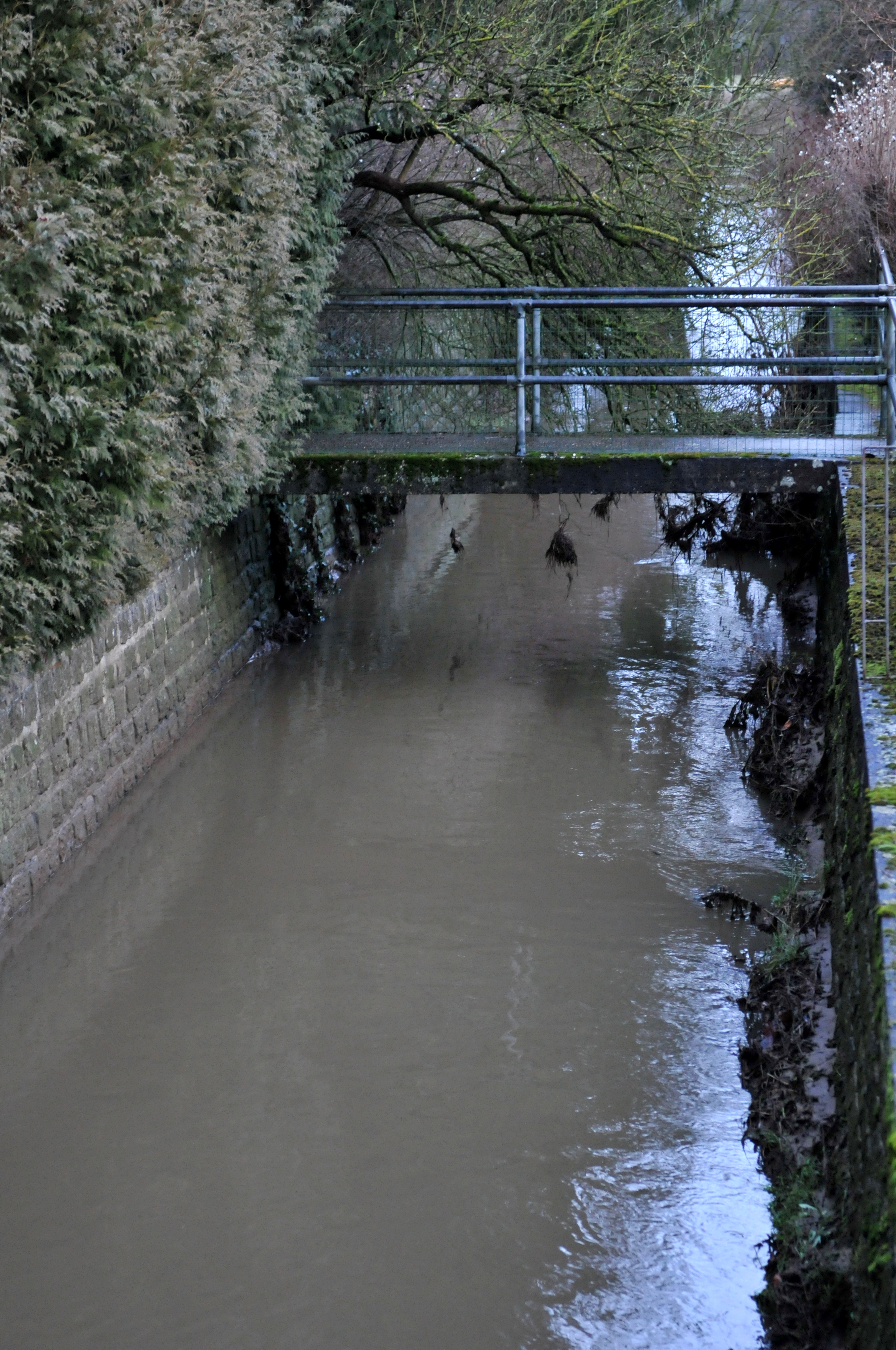 D'Kolerbaach zu Klengbetten.